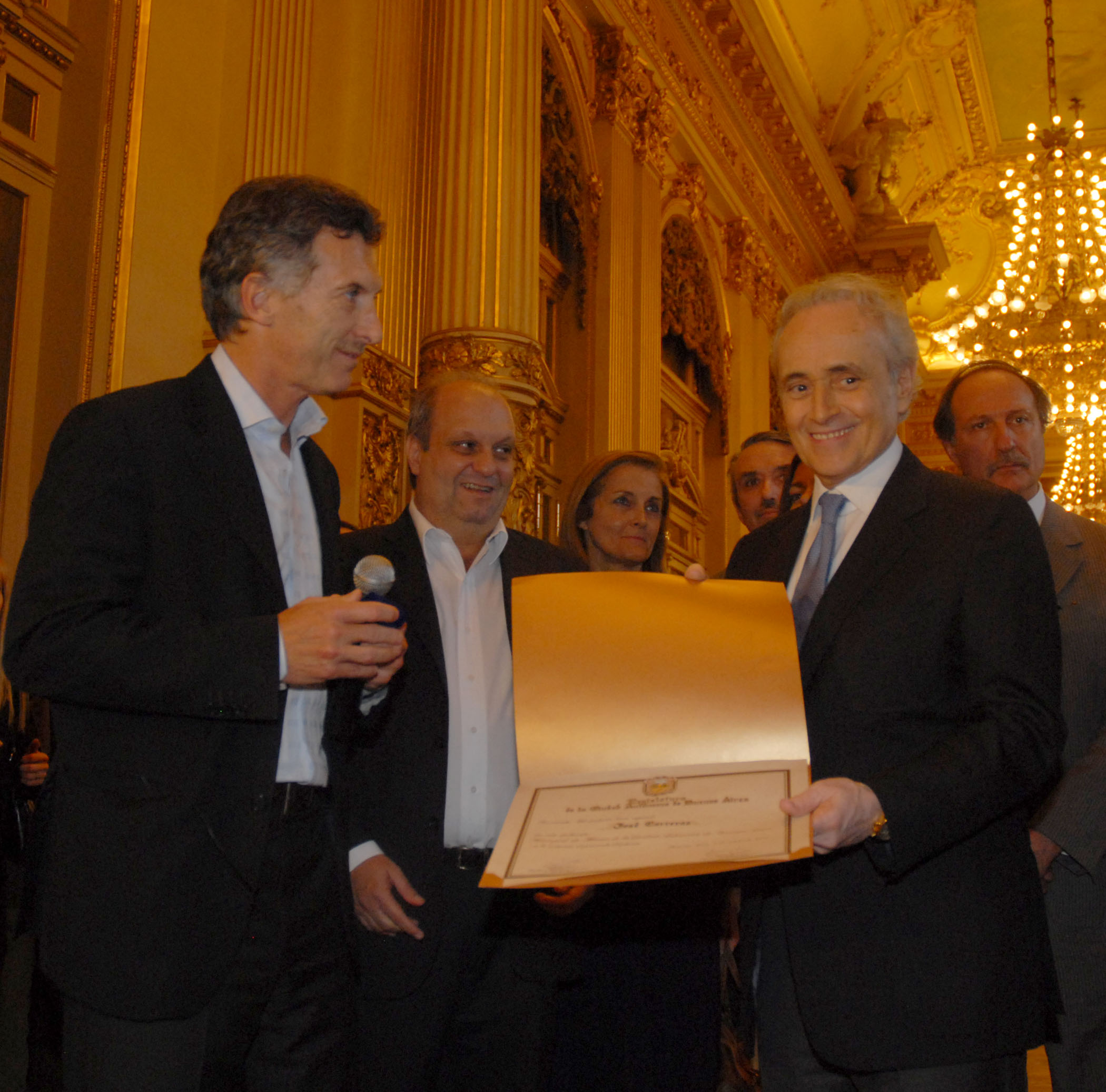 El Jefe de Gobierno porteño, Mauricio Macri, recibió en el Teatro Colon, al cantante lírico José Carreras, a quien entregó el pergamino de Visitante Ilustre de la Ciudad.- Foto Guillermo Viana-gv/GCBA.